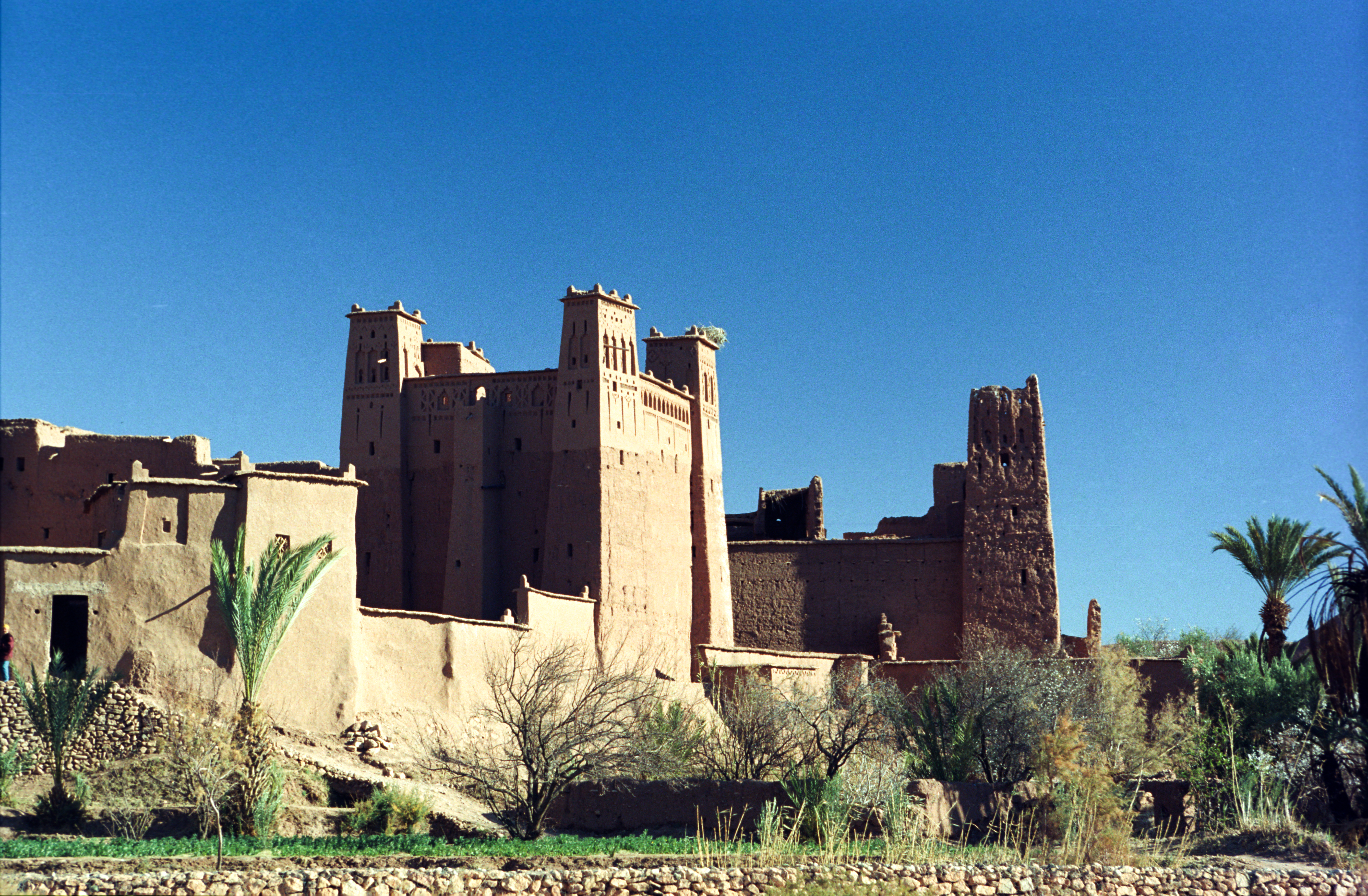 Aït Benhaddou